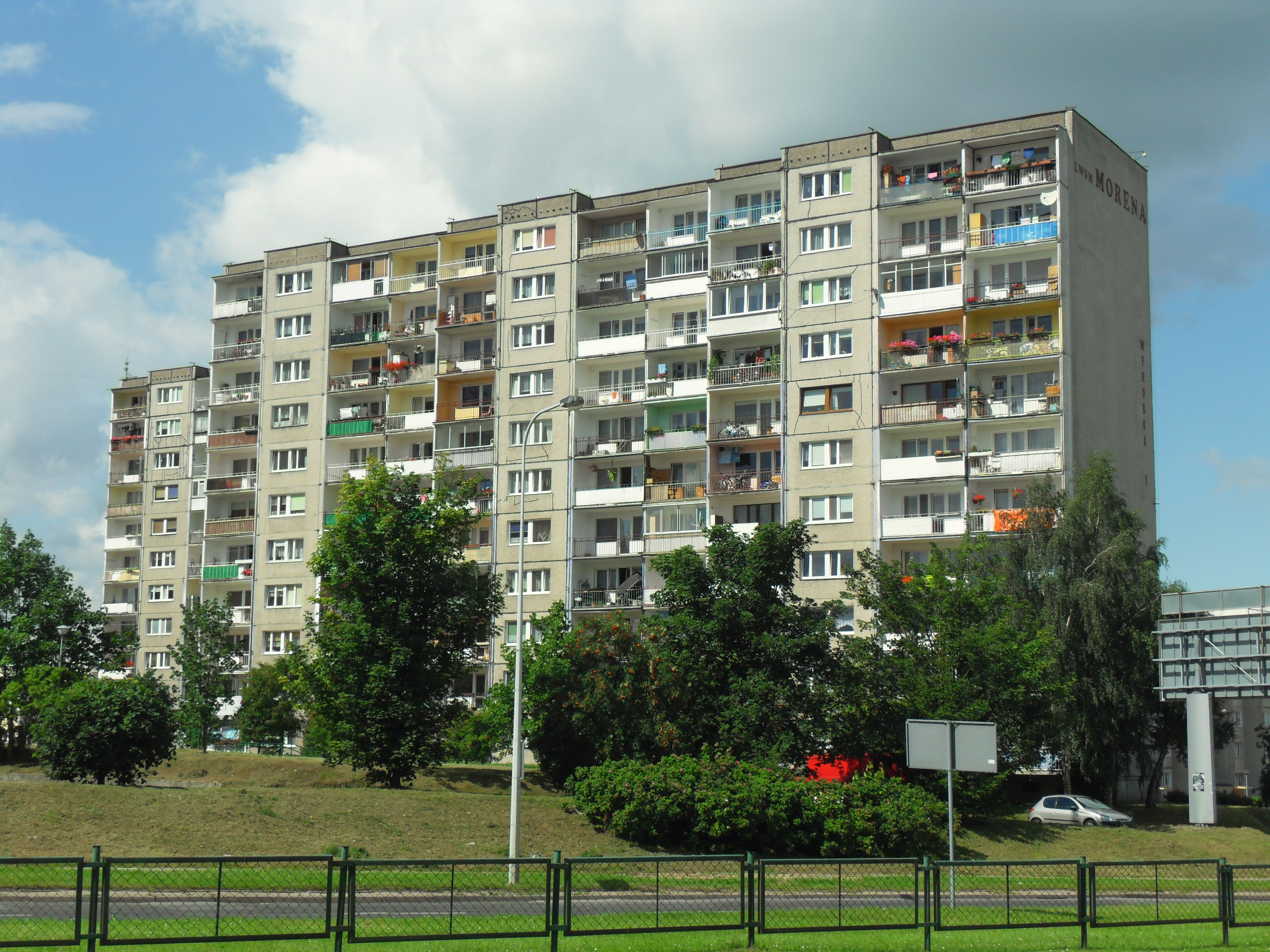 Gdańsk Migowo, ul. Wyrobka 1.